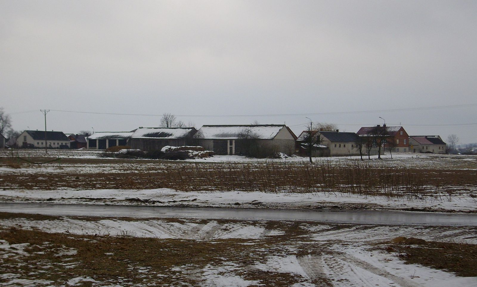 Stary Patok, widok północnej części wsi.